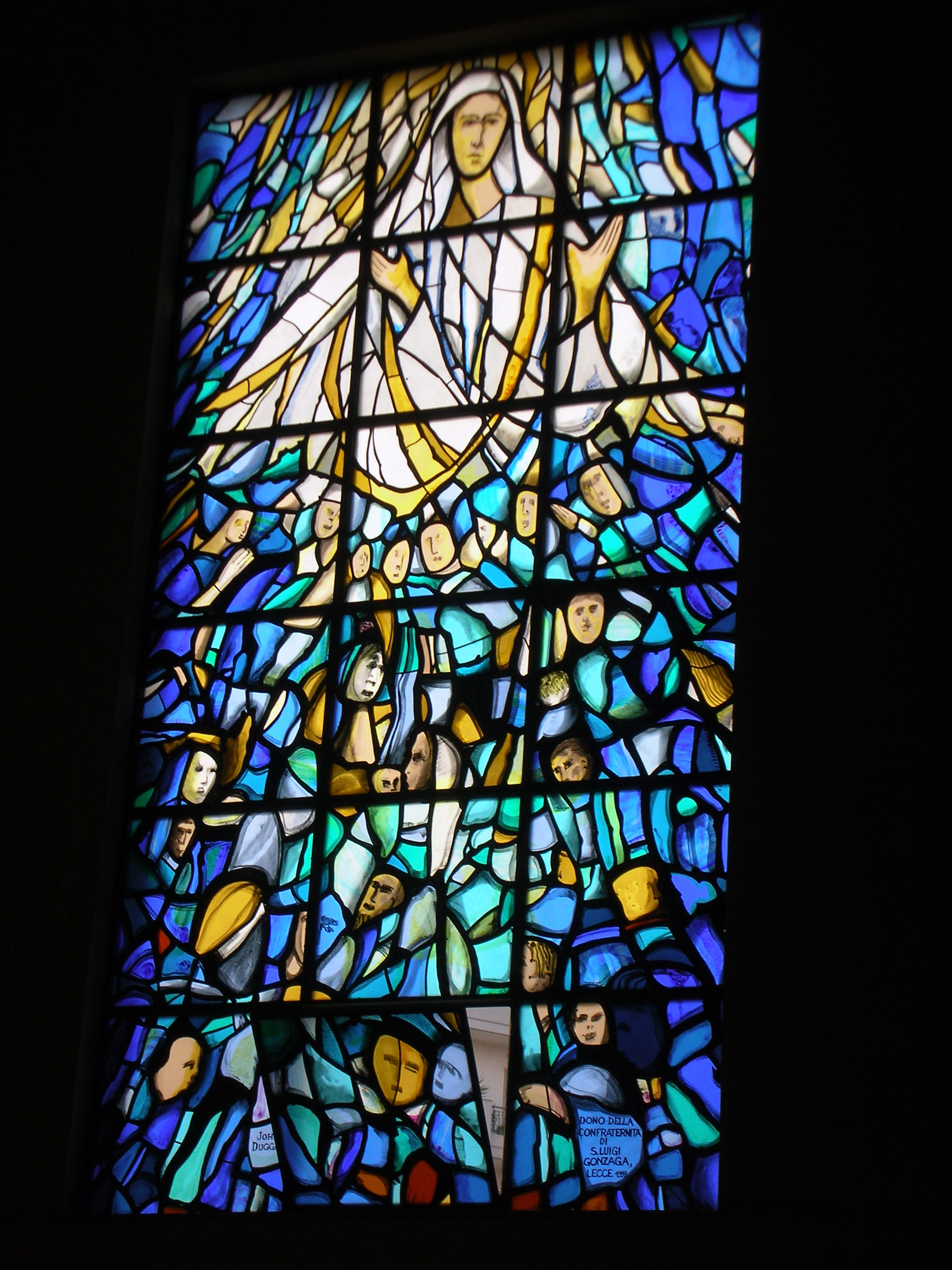 Particolare della vetrata nella Parrocchia